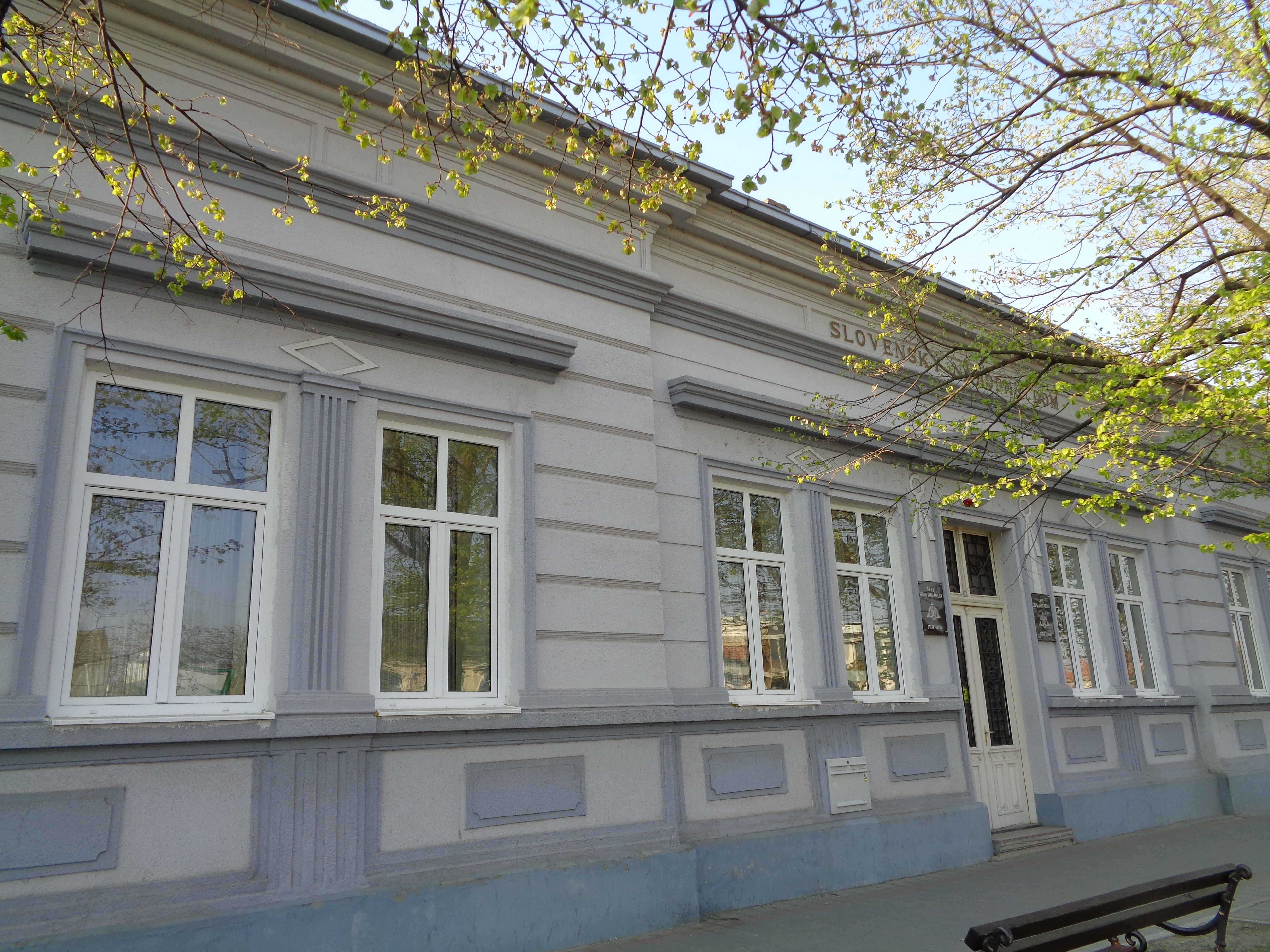 Stará Pazova, Slovenský národný dom